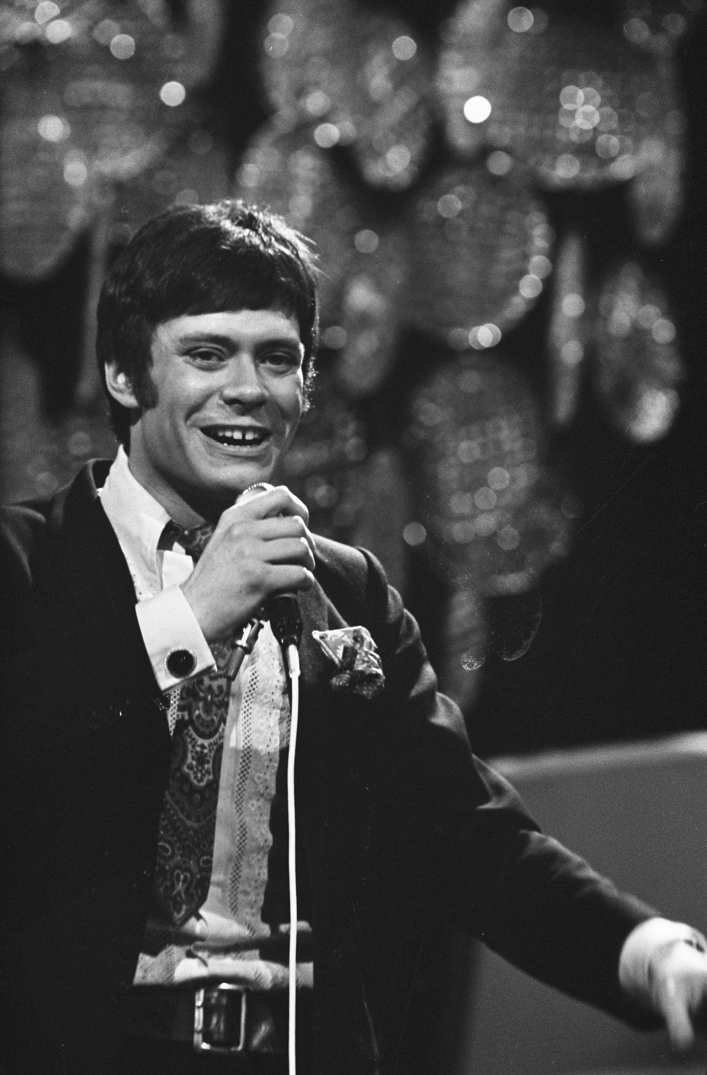 Collectie / Archief : Fotocollectie Anefo Reportage / Serie : [ onbekend ] Beschrijving : Nationale finale van het Eurovisie Songfestival in Scheveningen nr. 11 , 12: Rob de Nijs , nr. 13 , 14: Datum : 26 februari 1969 Locatie : Scheveningen, Zuid-Holland Trefwoorden : SONGFESTIVALS, finales Persoonsnaam : Nijs, Rob de Fotograaf : Koch, Eric / Anefo Auteursrechthebbende : Nationaal Archief Materiaalsoort : Negatief (zwart/wit) Nummer archiefinventaris : bekijk toegang 2.24.01.05 Bestanddeelnummer : 922-1432